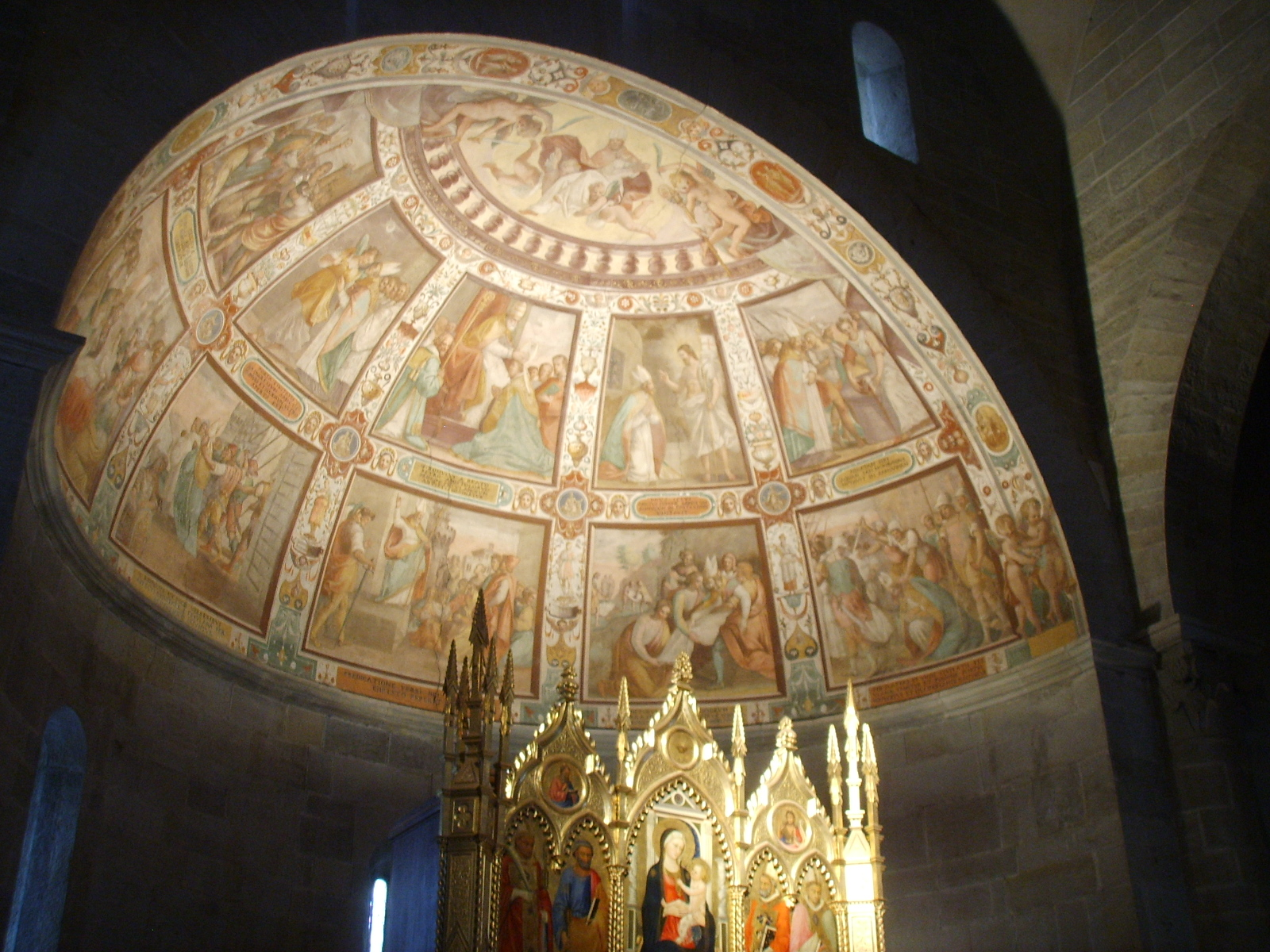 Duomo di fiesole, Nicodemo Ferrucci, Storie di San Romolo